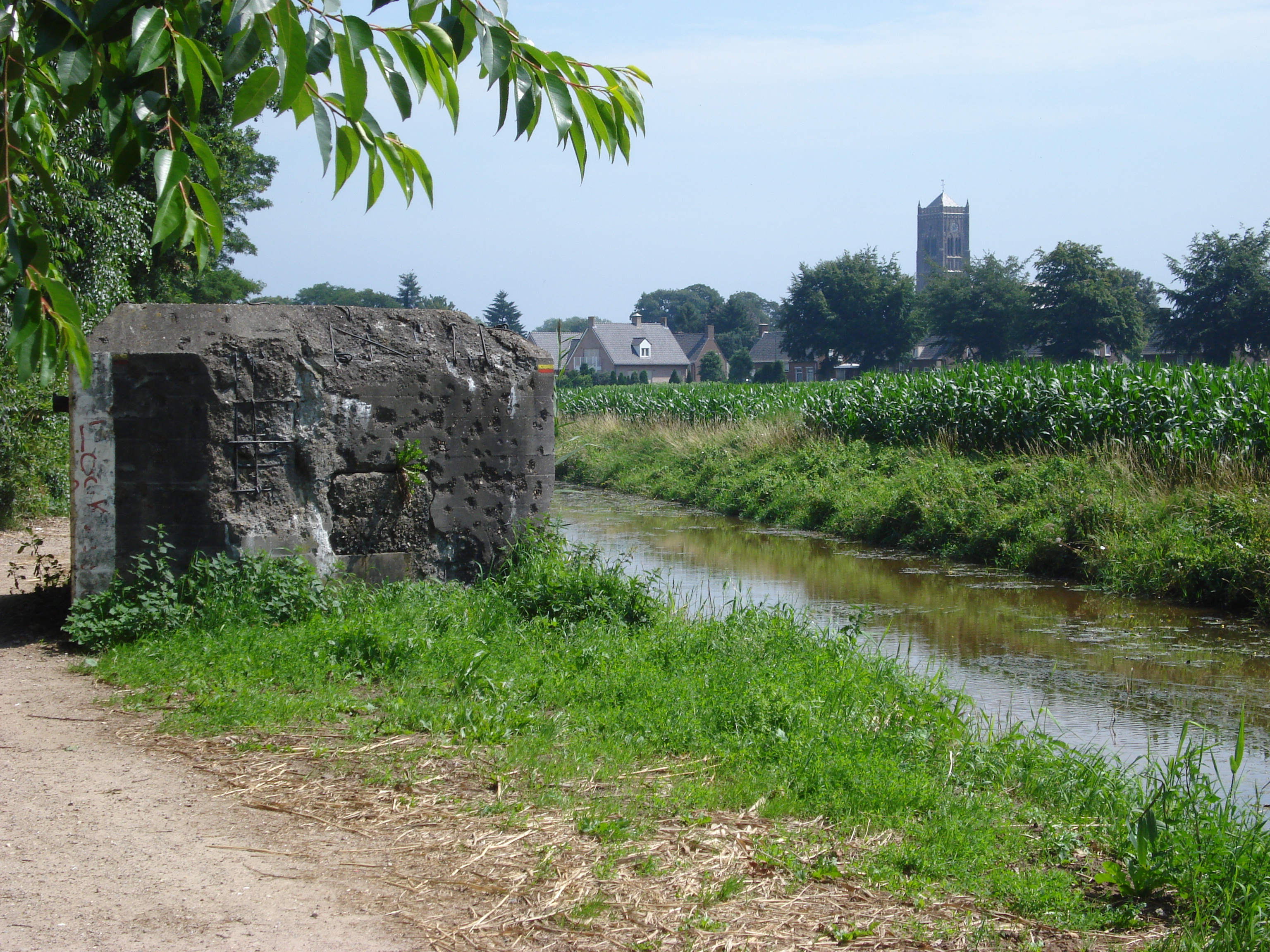 Mill, Noord-Brabant, Defensiekanaal